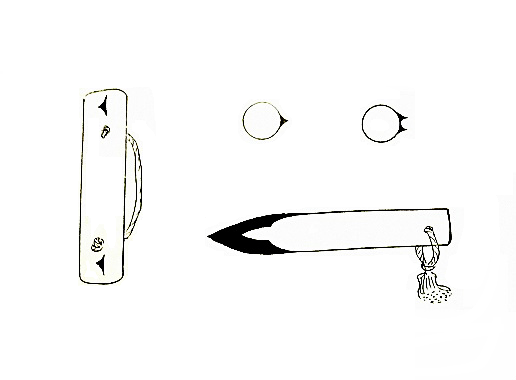 捕手の道具